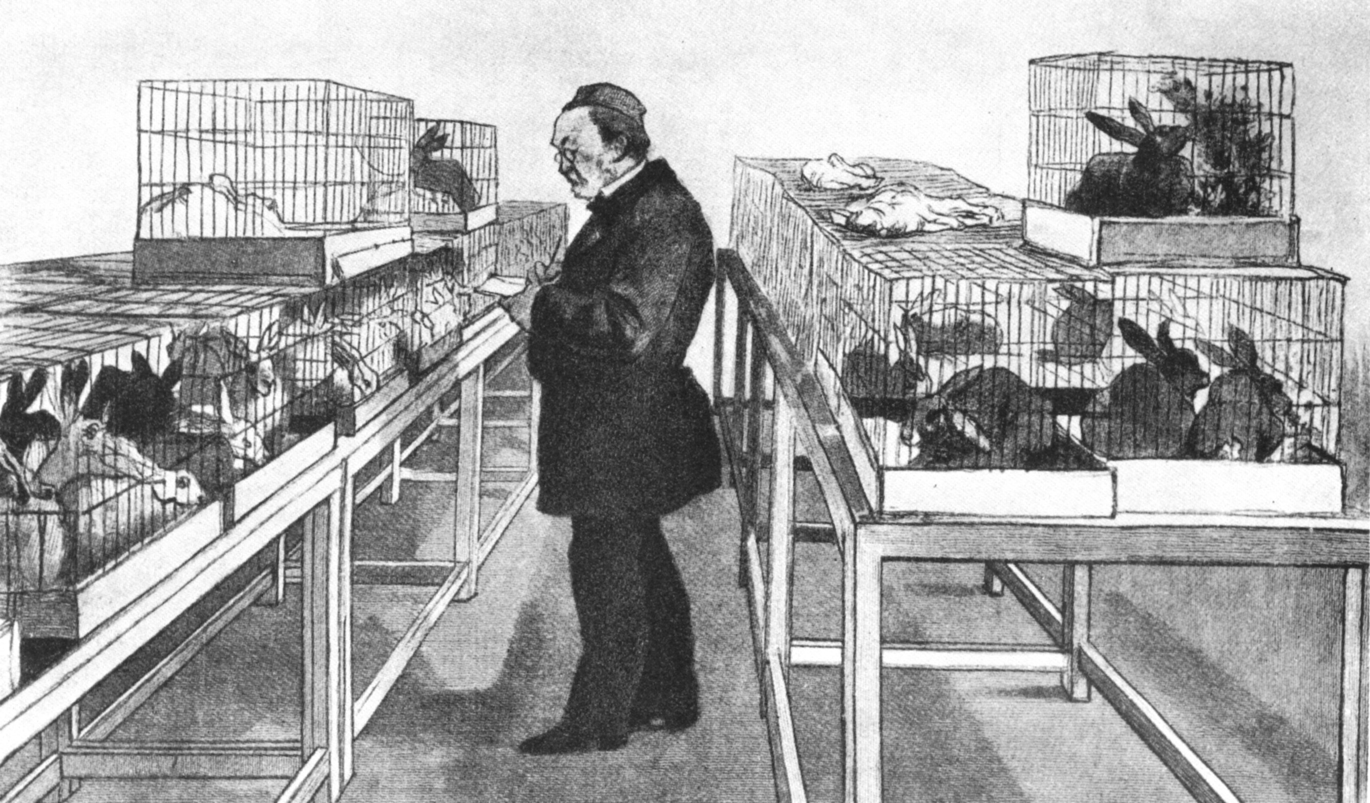 Louis Pasteur